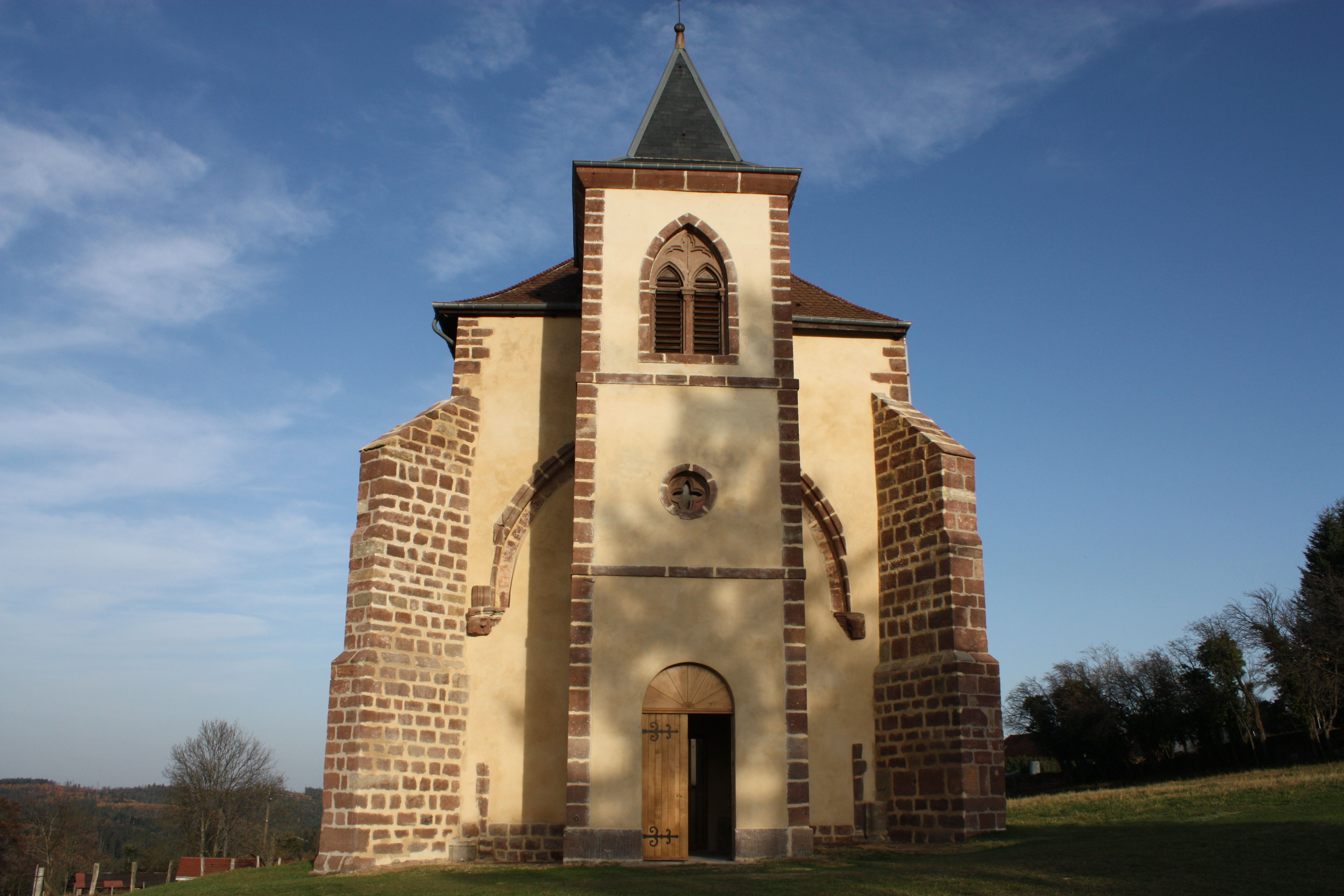 Choeur gothique de l'ancienne abbaye de Notre Dame de Saint-Sauveur, abbaye bénédictine transférée en 1010 de Bonmoutier